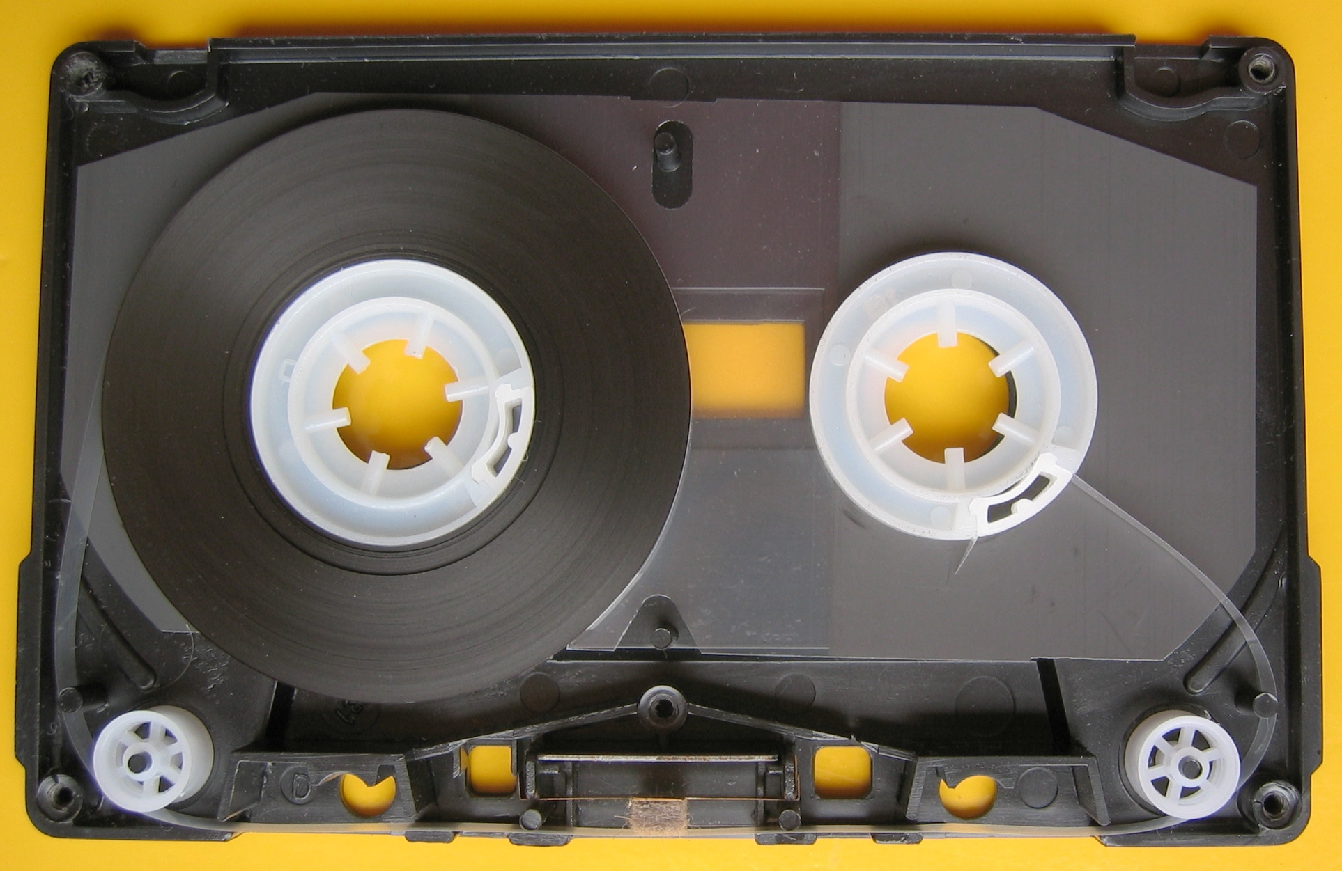 Compact Cassette ProfiSound 60